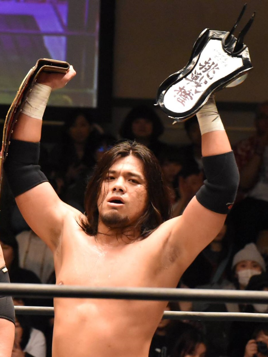 DDTプロレスリング佐々木大輔